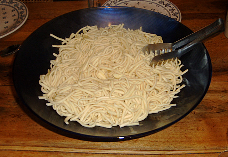 Beschreibung: Spätzle mit etwas Butter Quelle: selbst fotografiert Fotograf: Dbenzhuser Date: 5-2005